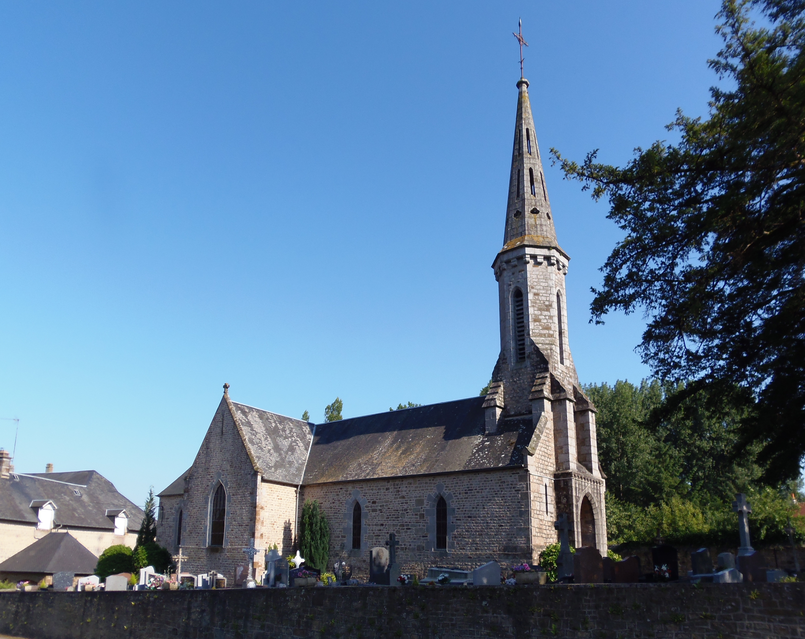 Hamelin (Normandie, France). L'église Saint-Martin.